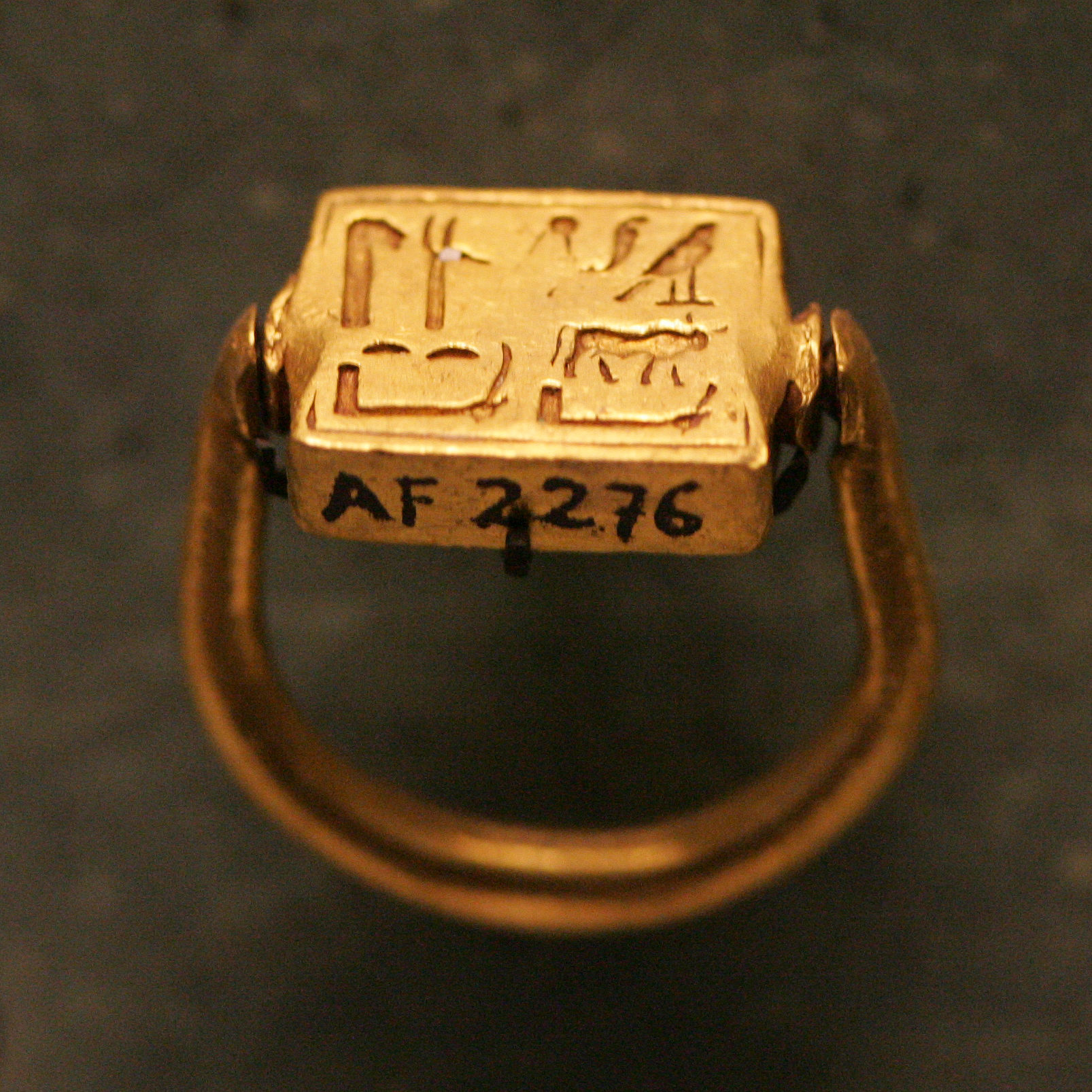 Artist Unknown artistDescription Chevalière aux noms d'Aménophis II et de Thoutmosis IIDimensions D. : 3,10 cm.Collection Louvre Museum (Inventory)Native nameMusée du LouvreParent institutionÉtablissement public du musée du Louvre LocationParisCoordinates48° 51′ 37.42″ N, 2° 20′ 15.36″ E Established1793 Web page control : Q19675 VIAF: 257711507 ISNI: 0000 0001 2260 177X ULAN: 500125189 LCCN: n80020283 NLA: 35912436 WorldCat institution QS:P195,Q19675Current location Louvre. Département des Antiquités égyptiennes. Salle 9. vitr. 6.Accession number AF 2271References Louvre.fr Louvre.frSource/Photographer Rama Chevalière aux noms d'Aménophis II et de Thoutmosis II